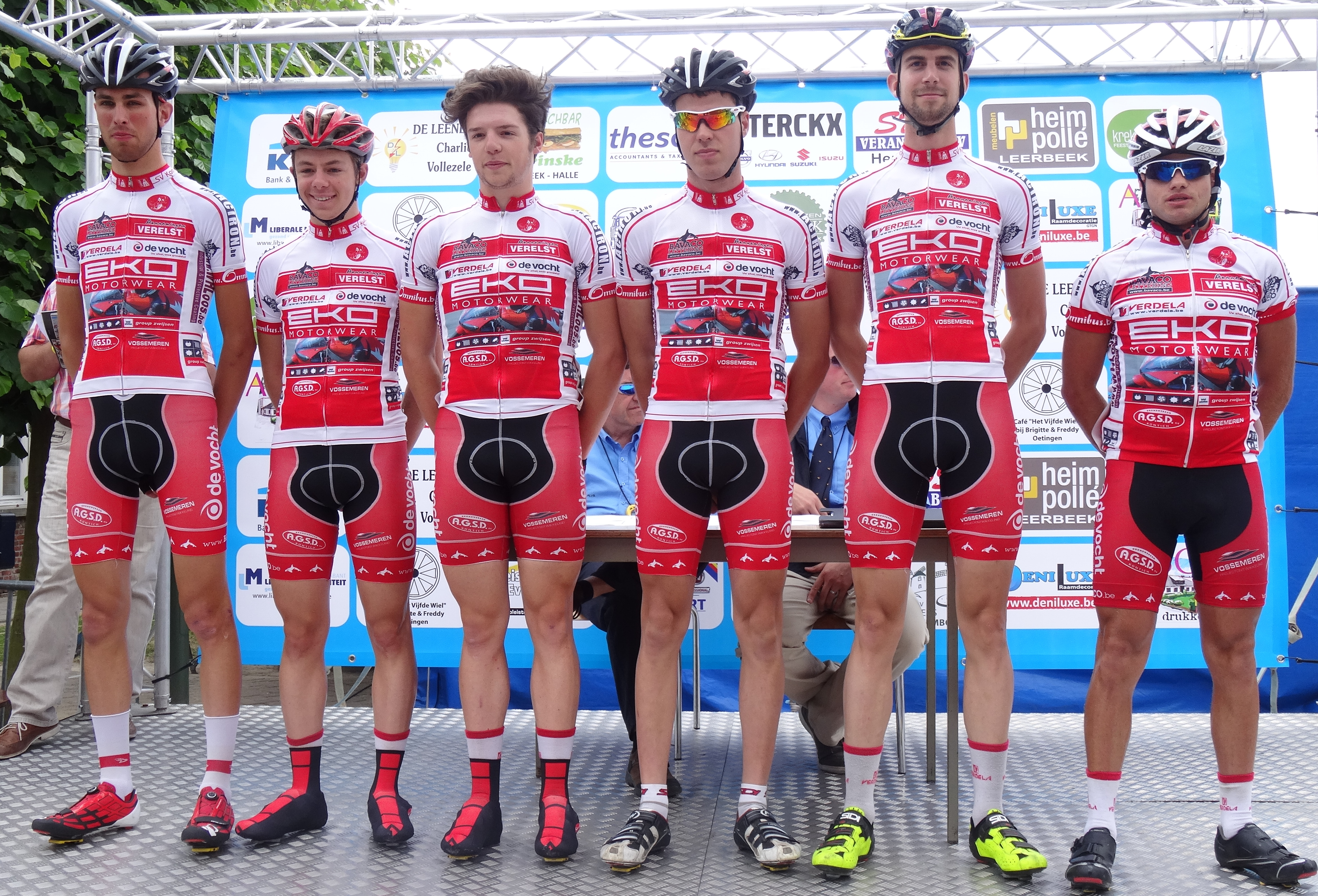 Reportage photographique réalisé le mercredi 25 juin à l'occasion du départ et de l'arrivée de l'Internationale Wielertrofee Jong Maar Moedig 2014 à Oetingen (Gooik), Belgique.